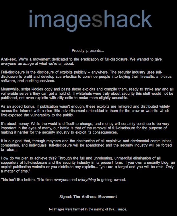 Anti-Sec manifesto